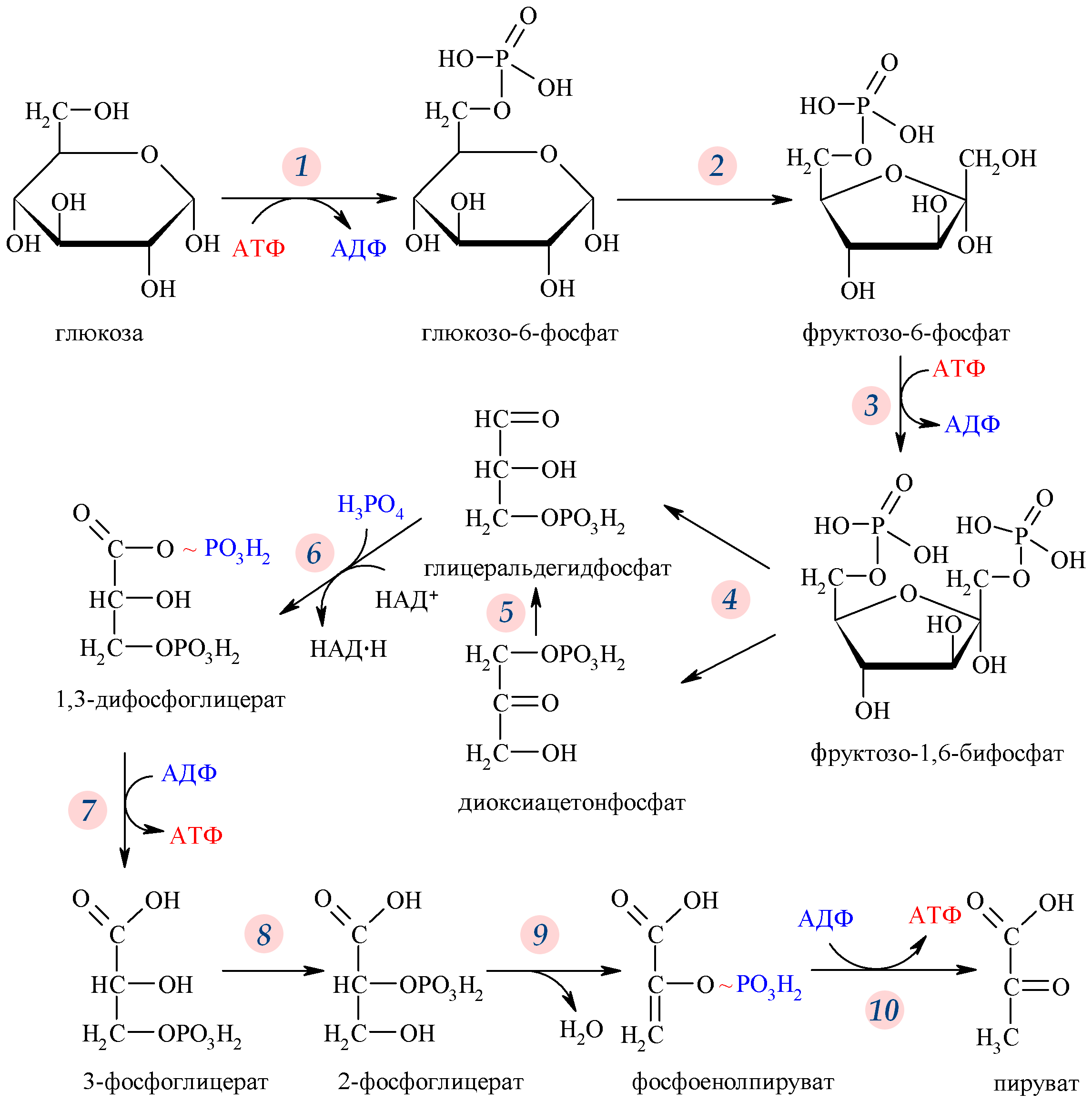 Ферменты: 1 — Гексокиназа 2 — Глюкозо-6-фосфатизомераза 3 — ru:6-Фосфофруктокиназа 4 — Альдолаза 5 — Триозофосфатизомераза 6 — Глицеральдегидфосфатдегидрогеназа 7 — Фосфоглицераткиназа 8 — Фосфоглицеромутаза 9 — Eнолаза 10 — Пируваткиназа